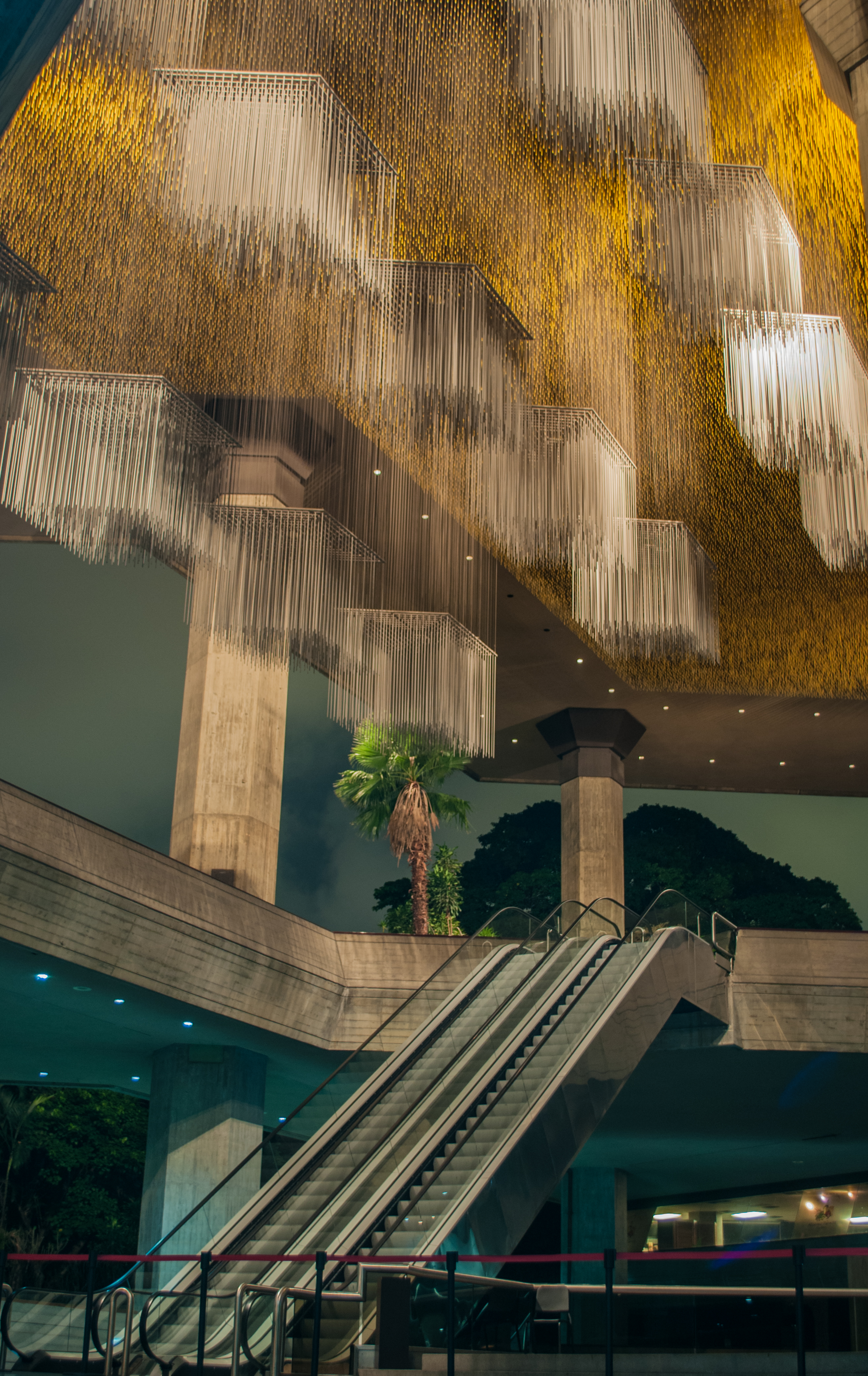 Escaleras en Teatro Teresa Carreño